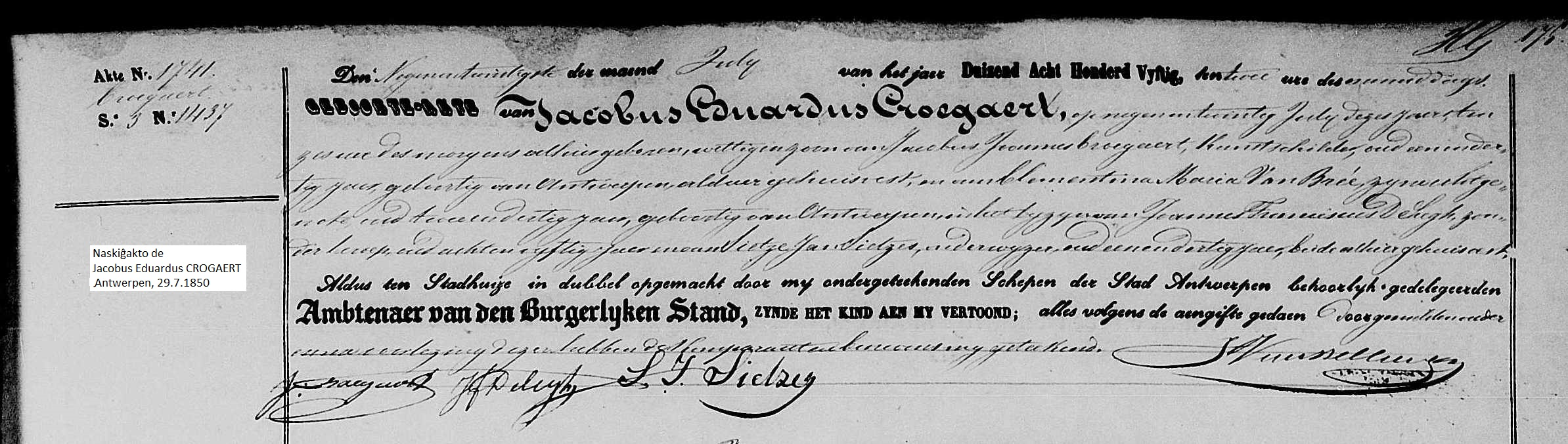 Geboorteakte van Jacobus Eduardus Croegaert, Antwerpen, 29.7.1850, zoon van Jacobus Joannes, kunstschilder en van Clementina Maria Van Bree